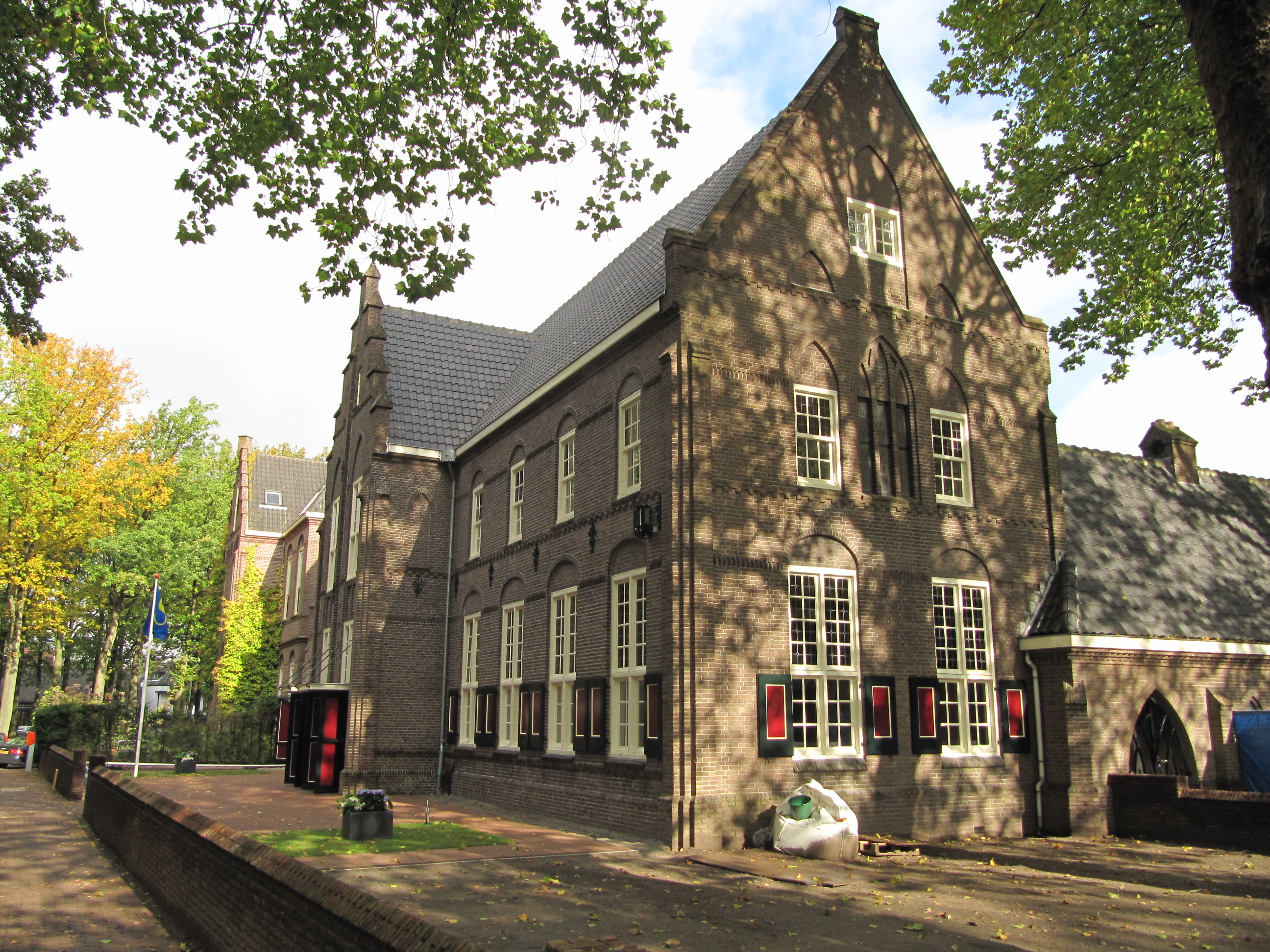 RM511272 Laren - Brink 29 (foto 2).jpg